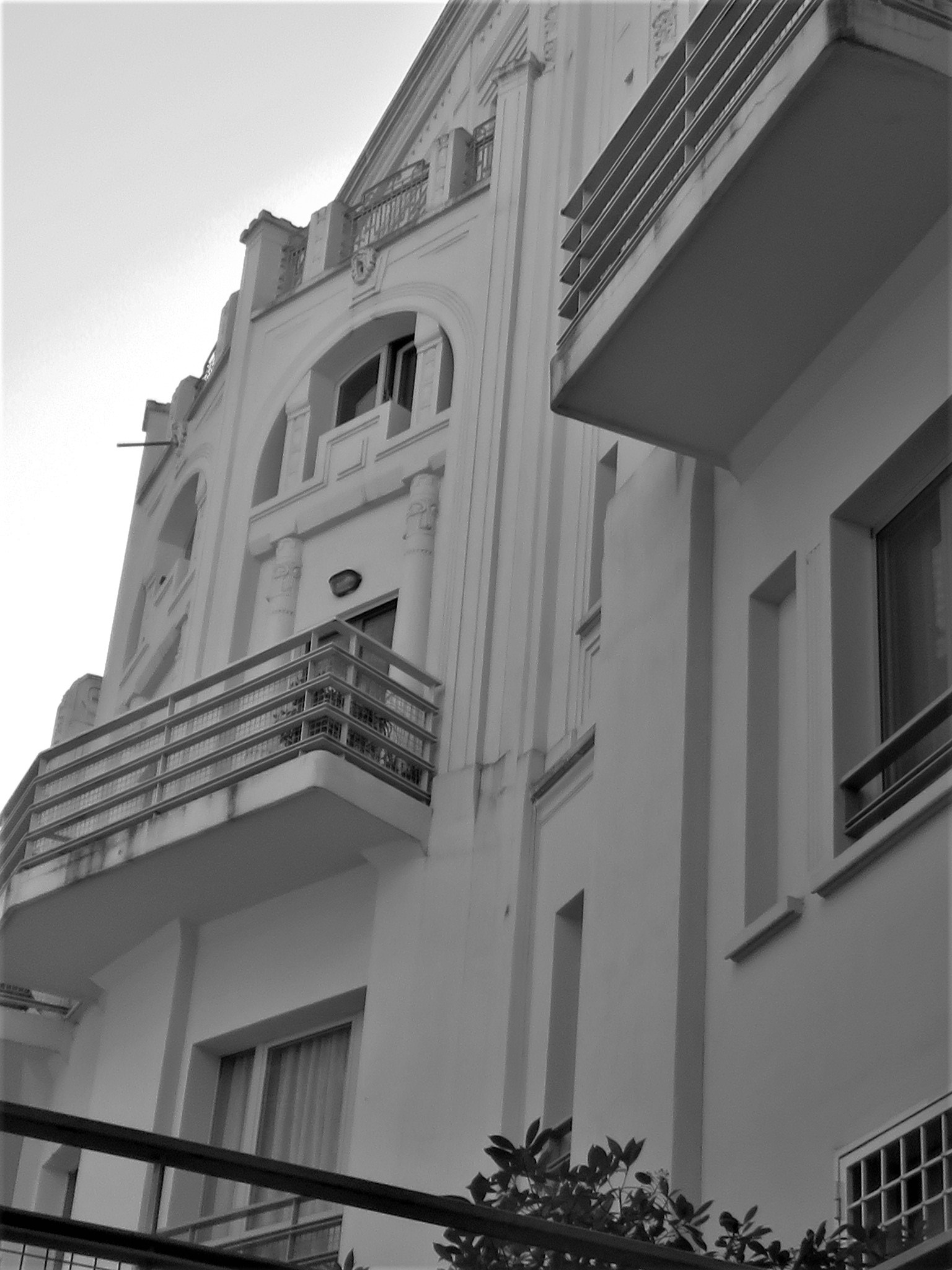 Palazzo Panfilio, vista parziale della facciata dal lato di corso Isonzo